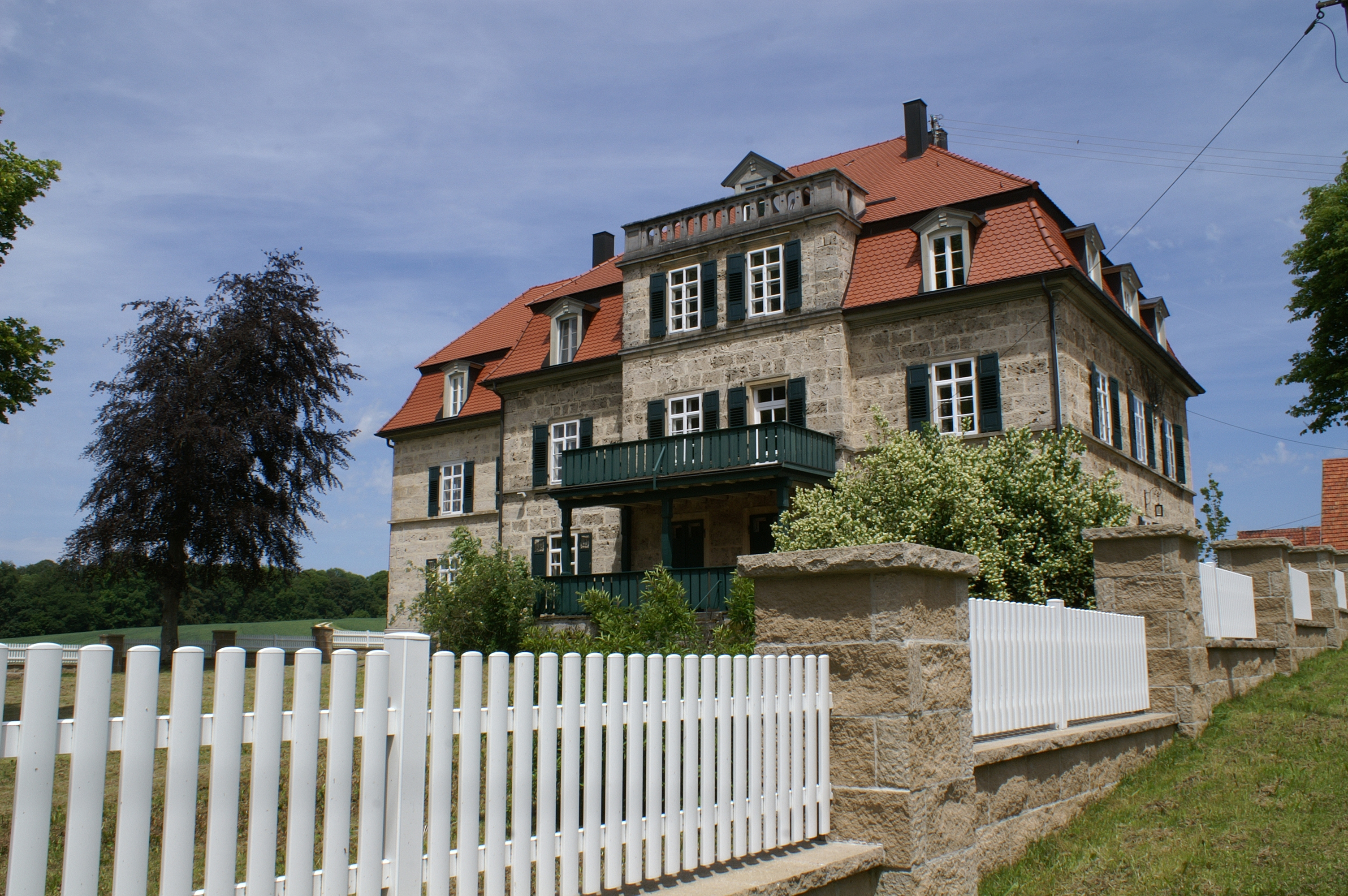 Das Herrenhaus des Hofgutes Aglishardt in Römerstein auf der Schwäbischen Alb im Besitz der Freiherr von Tessin'schen Gutsverwaltung.